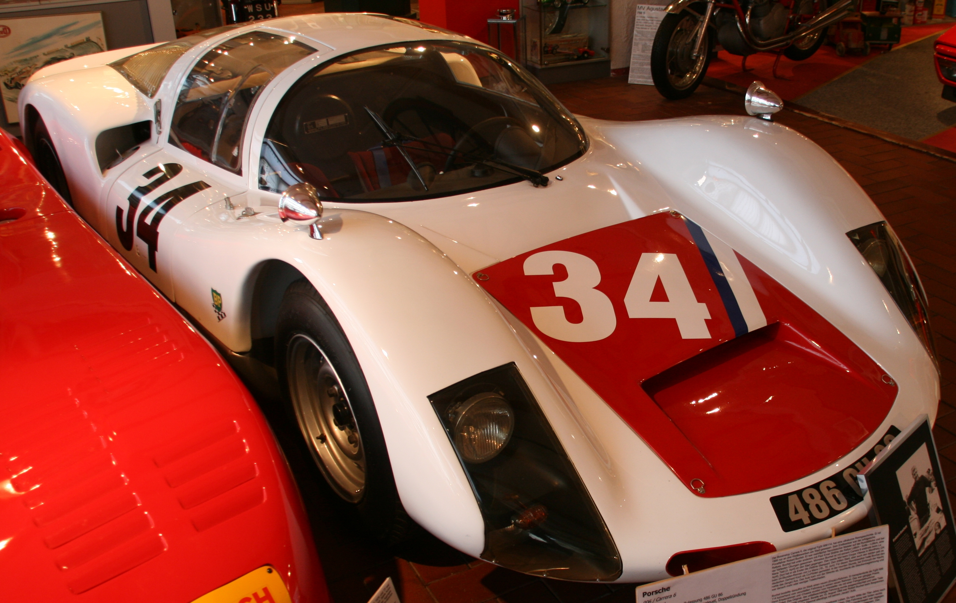 Porsche 906 im Boxenstop Tübingen